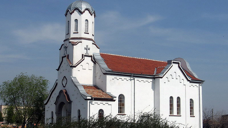 Църквата на Млекарево